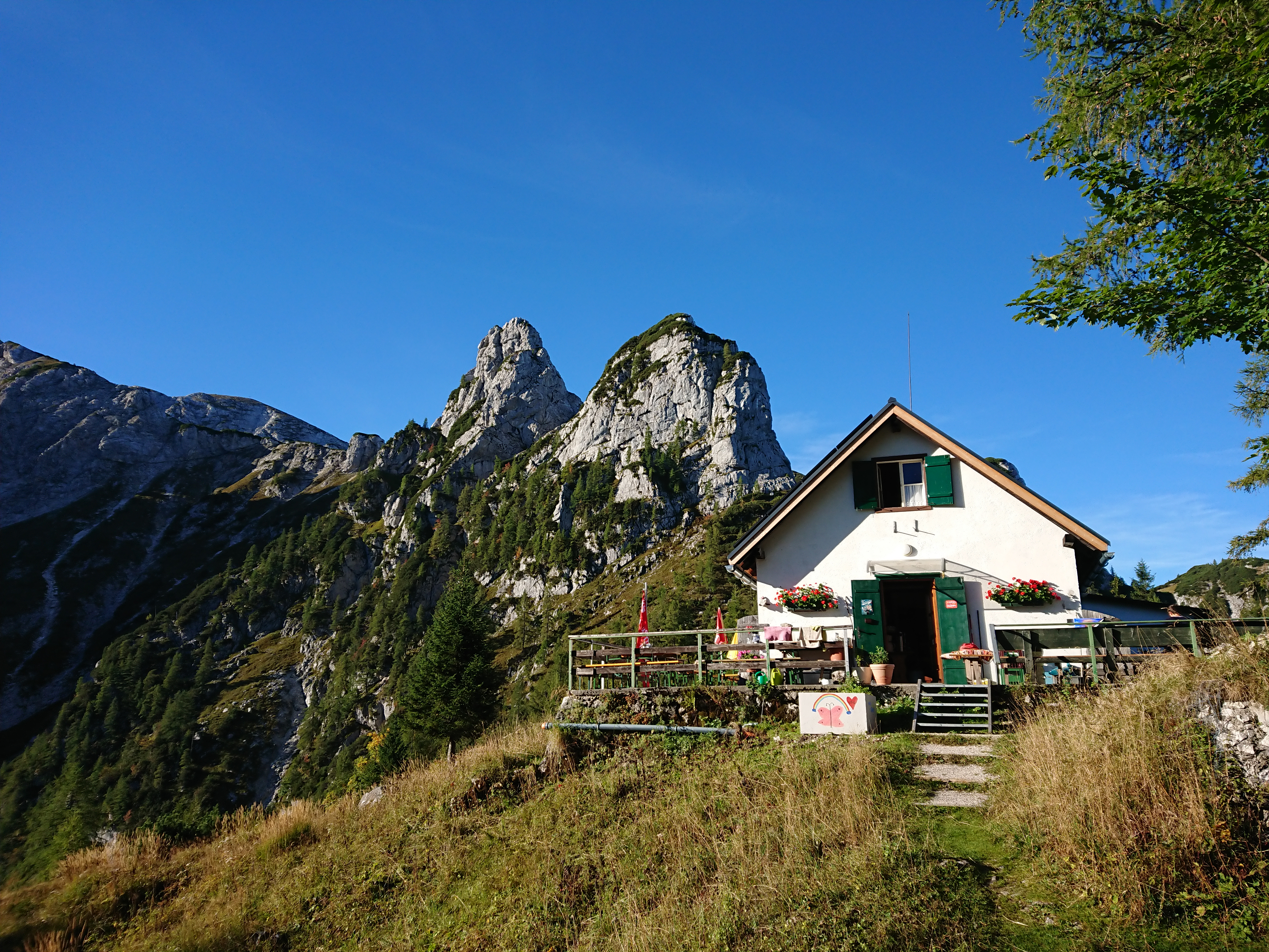 Hochkogelhaus mit Blick auf Rauenkogel